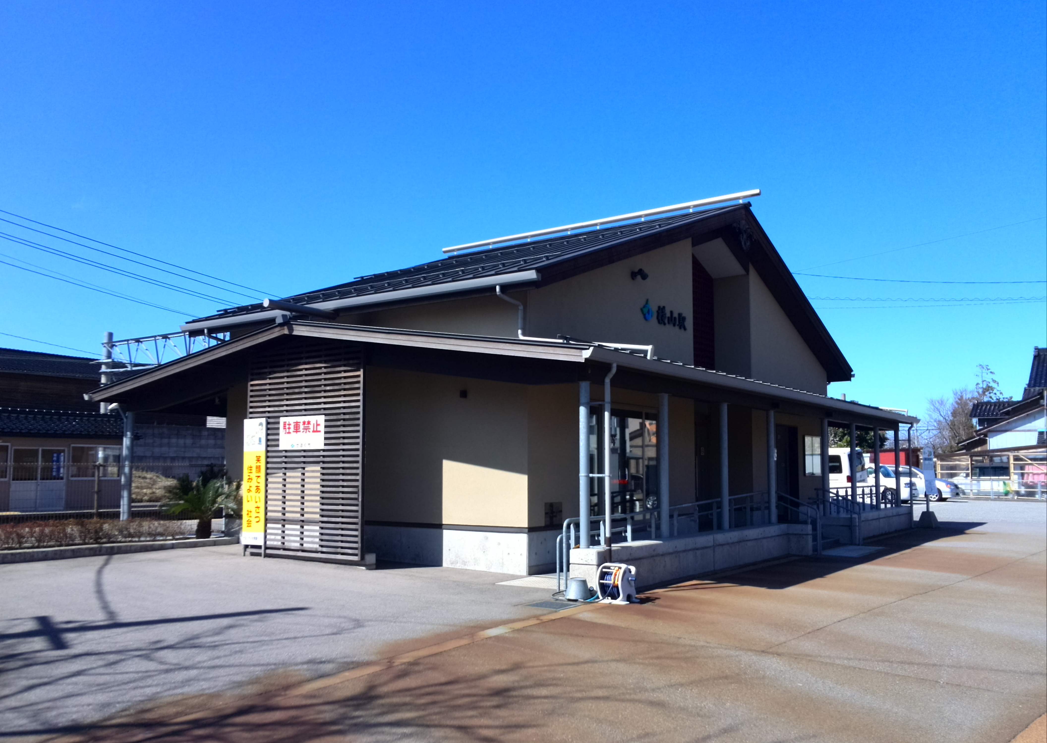 七尾線横山駅舎